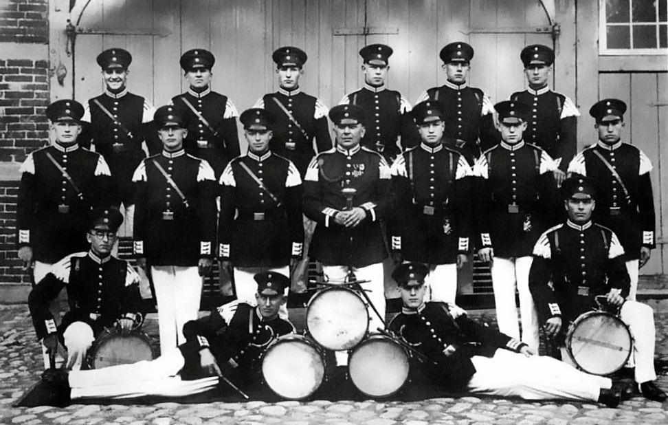 Boizenburger Traditionsmusikzug des Grenadier-Regiments Nr. 89 unter Führung des Sägewerkbesitzers Dührkopp um 1930.